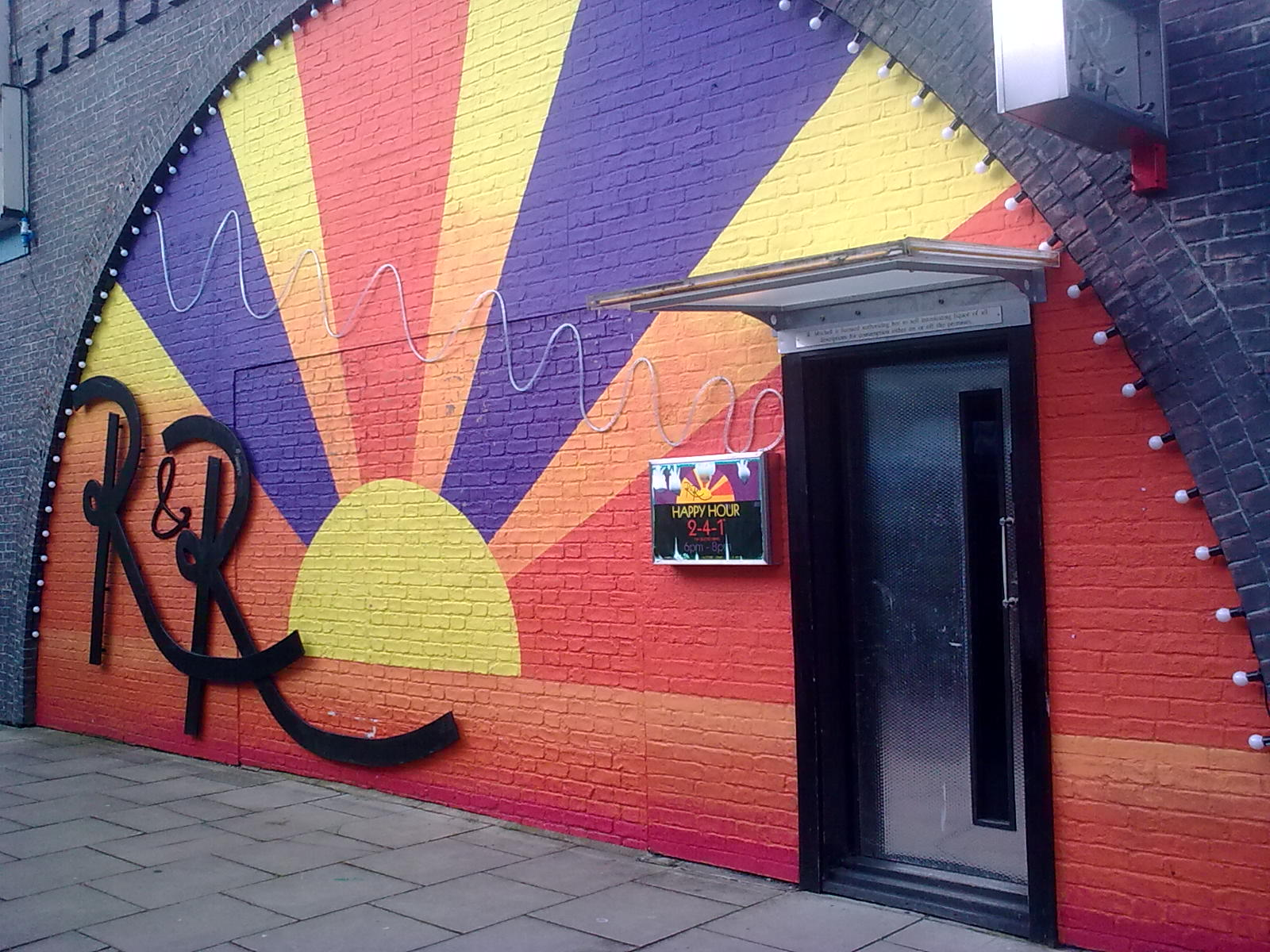 EastEnders R&R